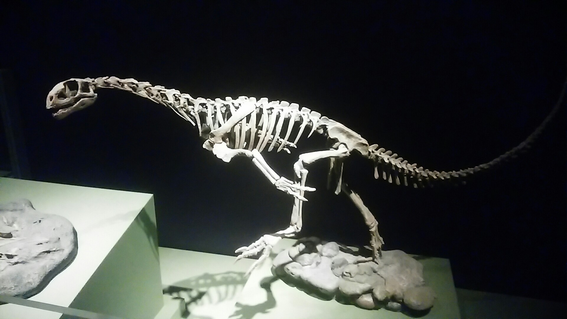 Chilesaurus diegosuarezi